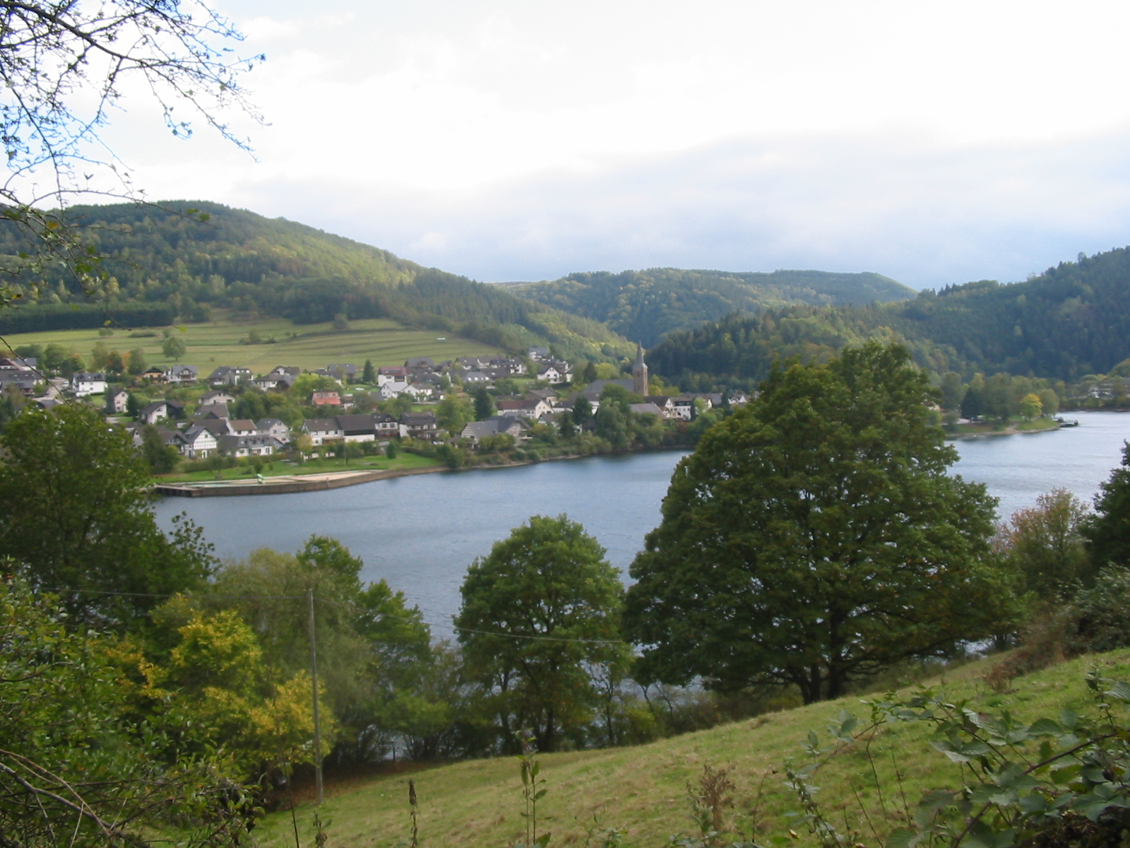 Einruhr with Obersee, Eifel, Germany